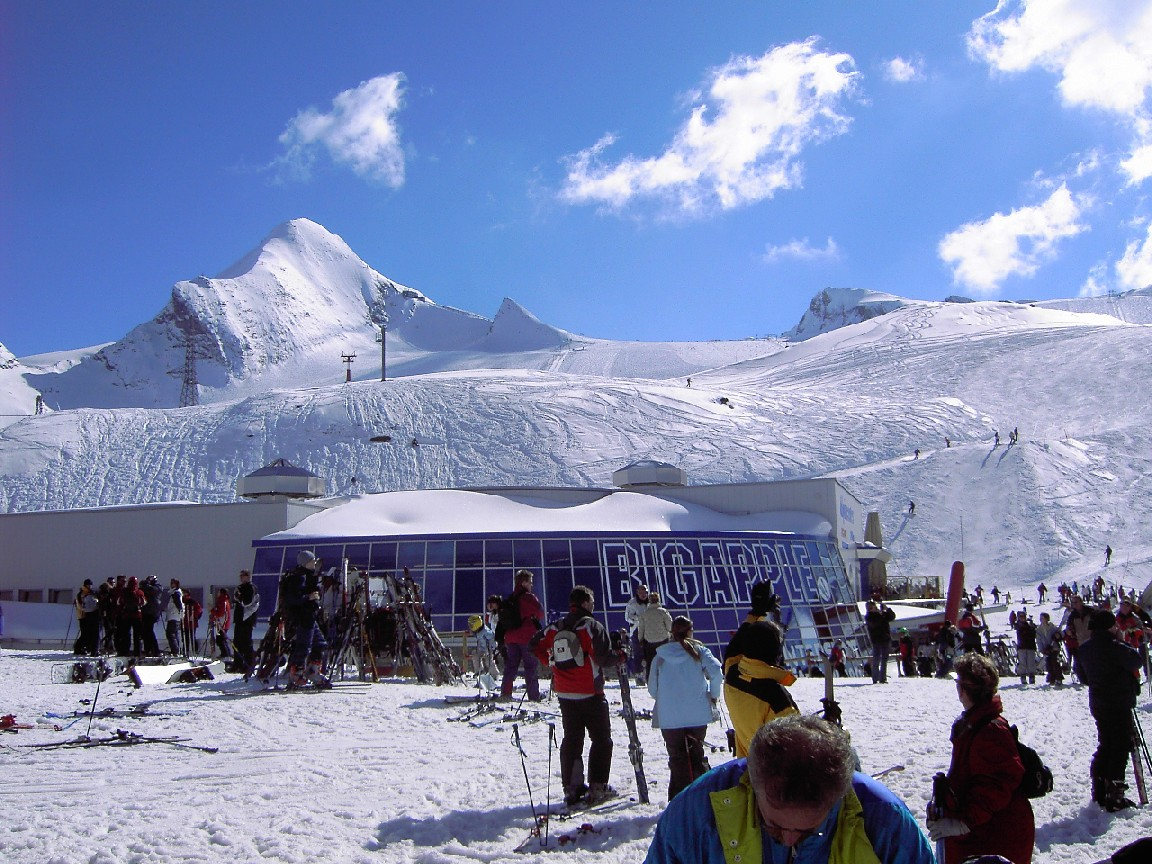 Kitzsteinhorn in Höhe Alpin-Center